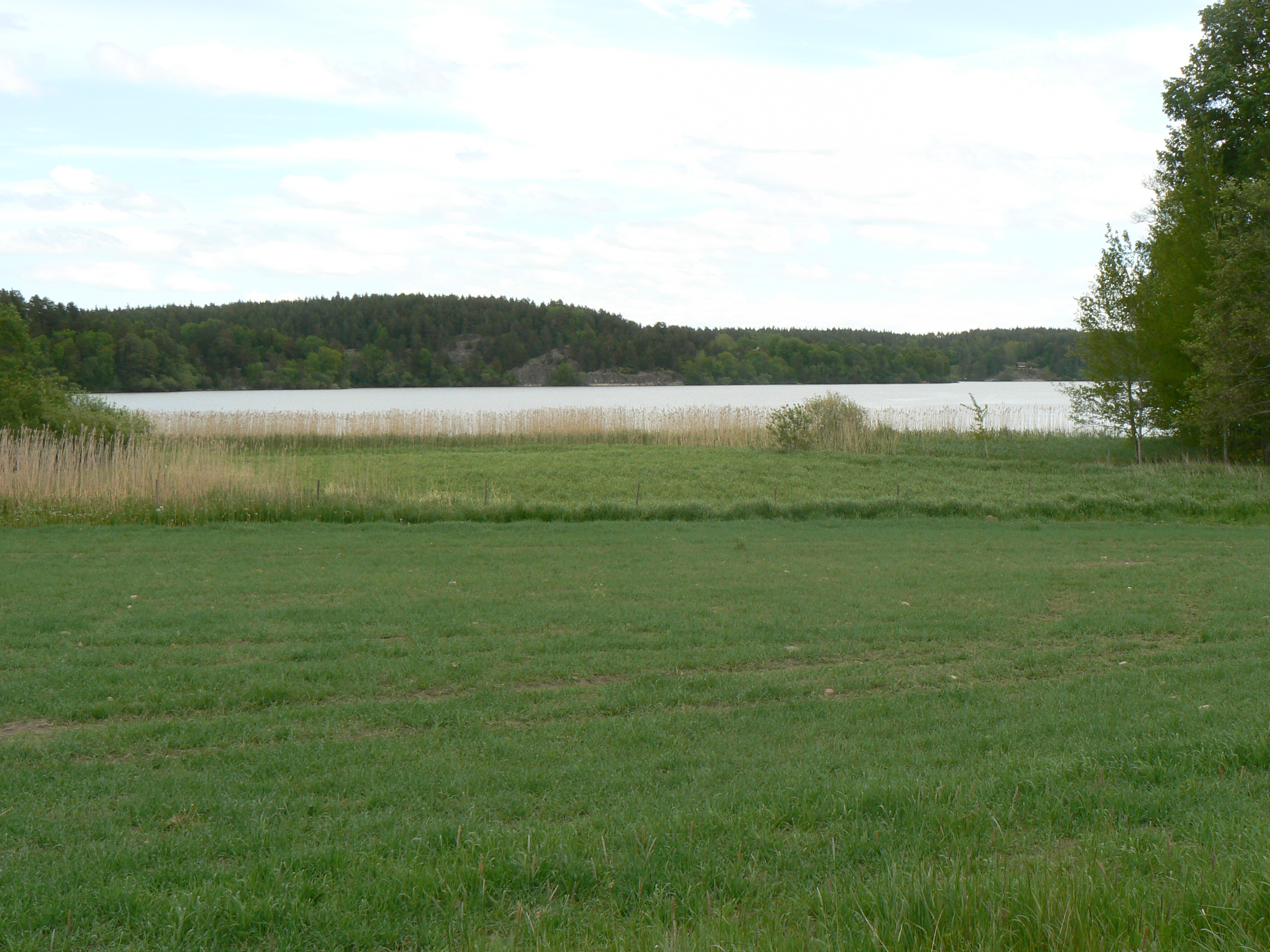 Lake Svinstadsjön in Linköping municipality, Östergötland, Sweden.